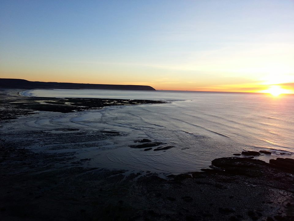 Amanecer en la Punta Peligro y Playa Alsina